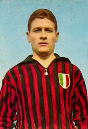 Luigi Radice con la maglia del Milan nella stagione 1962-63.